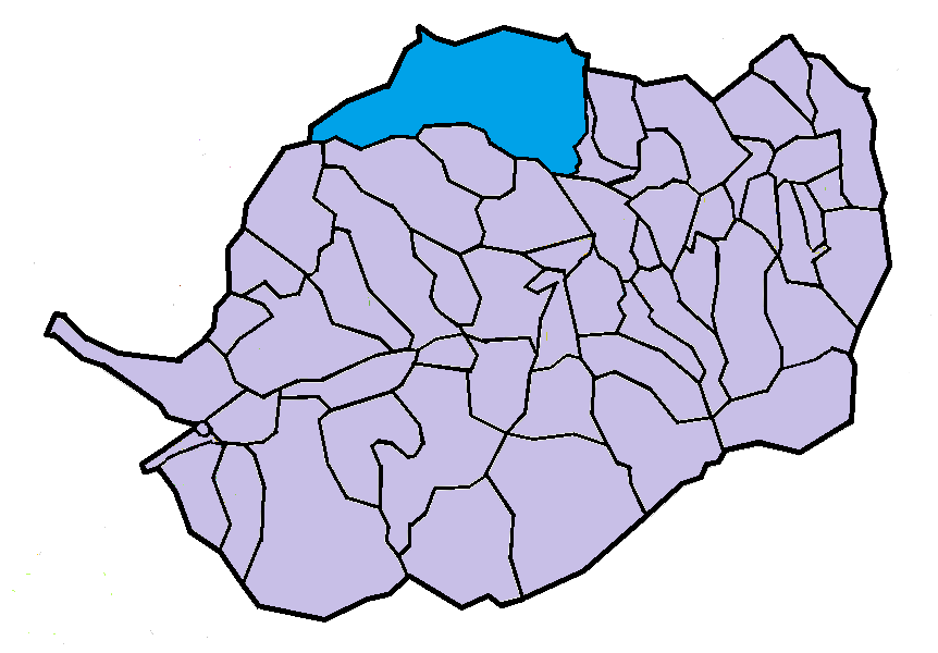 Mosset en el Conflent, a partir del mapa municipal del Conflent de lliure disposició adaptat al Nomenclàtor toponímic aprovat el 2007